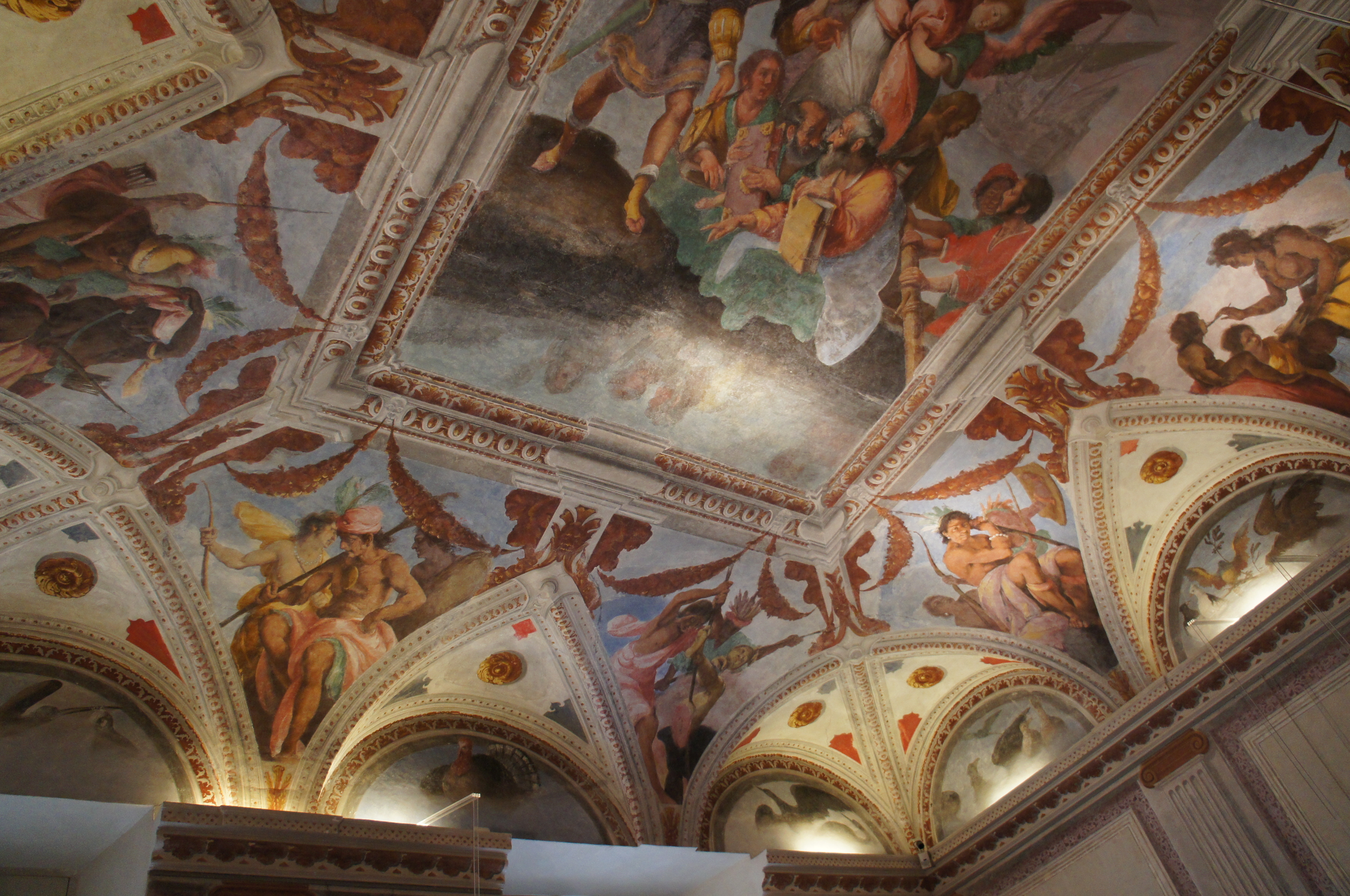 Palazzo Podestà, Genova